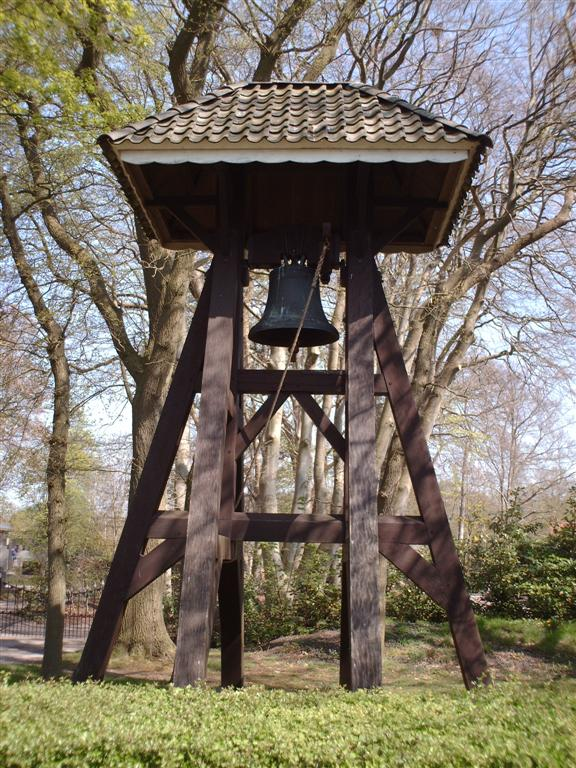 Klokkenstoel in Hemrik